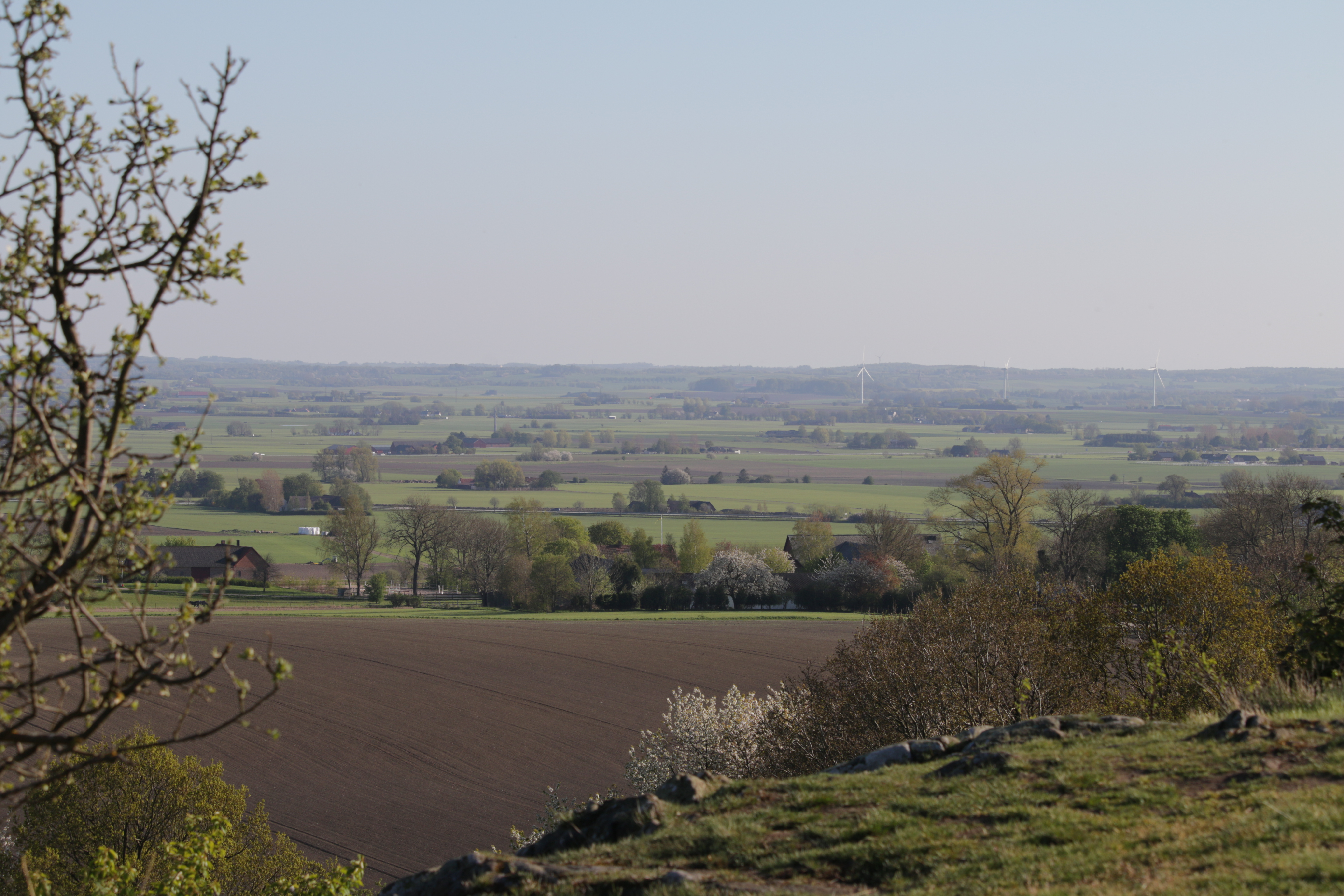 Billebjär